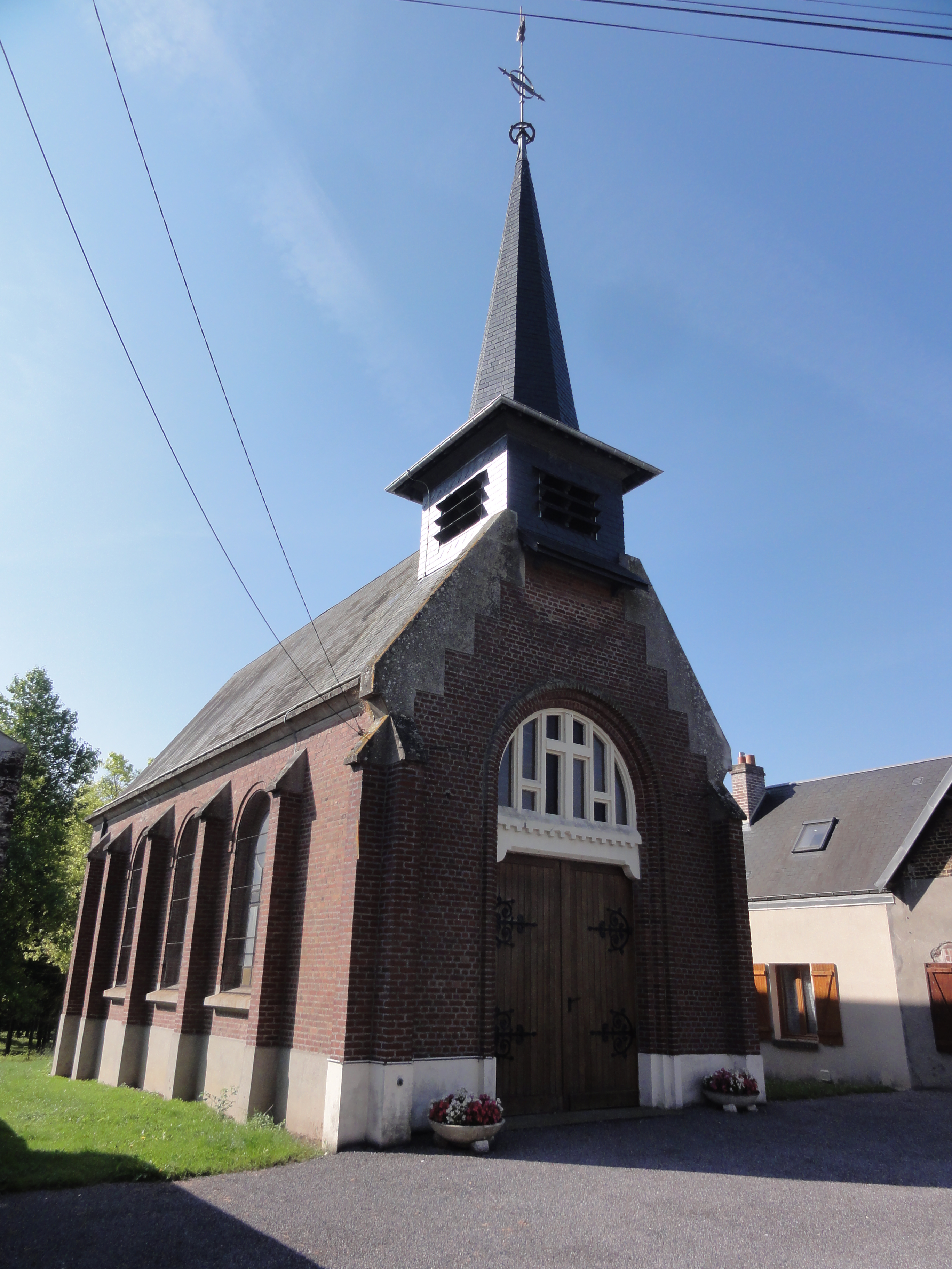 Châtillon-sur-Oise (Aisne) église